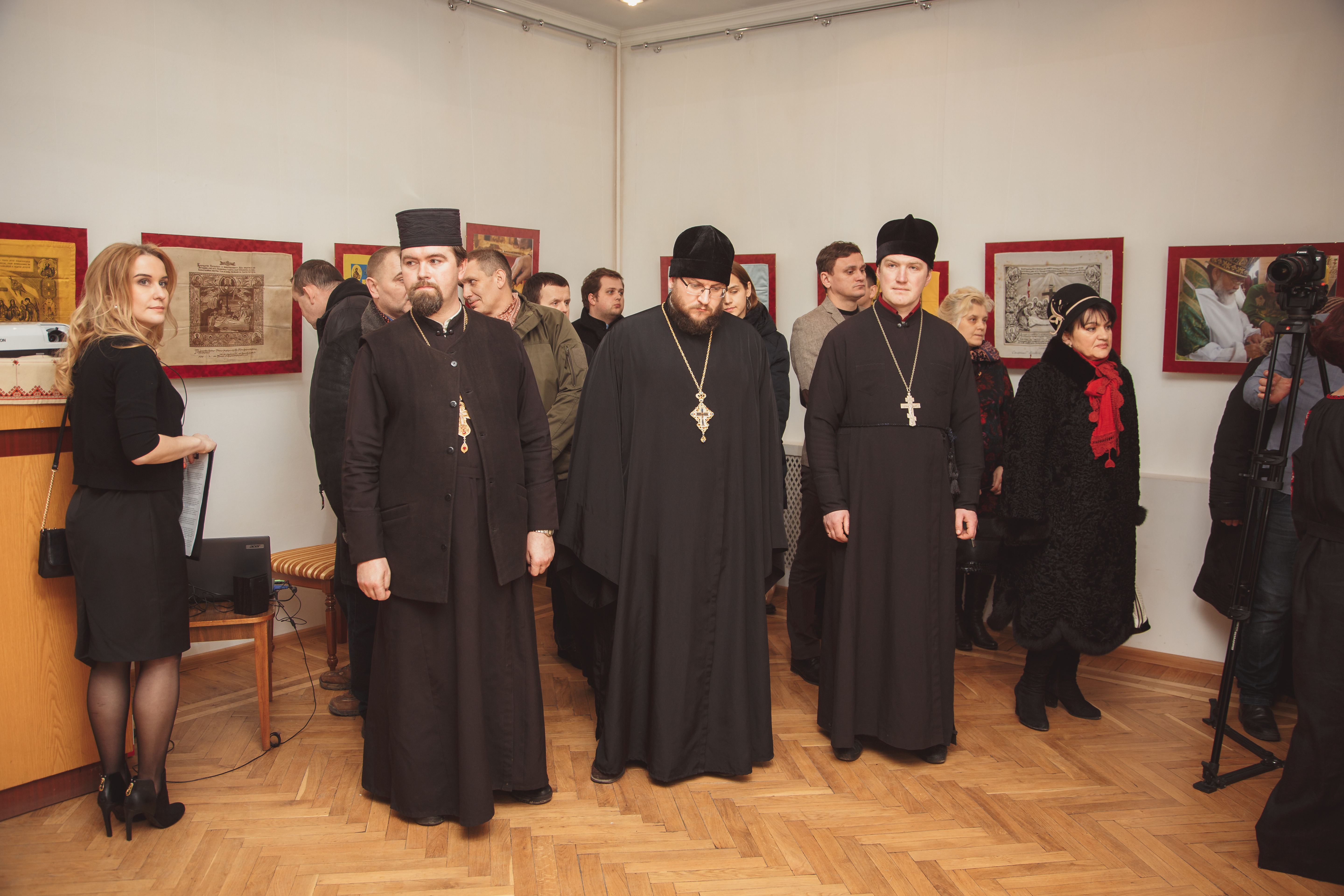 Тернопільський обласний краєзнавчий музей. Відкриття виставки пам’яті Блаженнішого Мефодія, митрополита Київського і всієї України, Предстоятеля Української автокефальної православної церкви, організованої Фондом пам`яті Блаженнішого Митрополита Мефодія